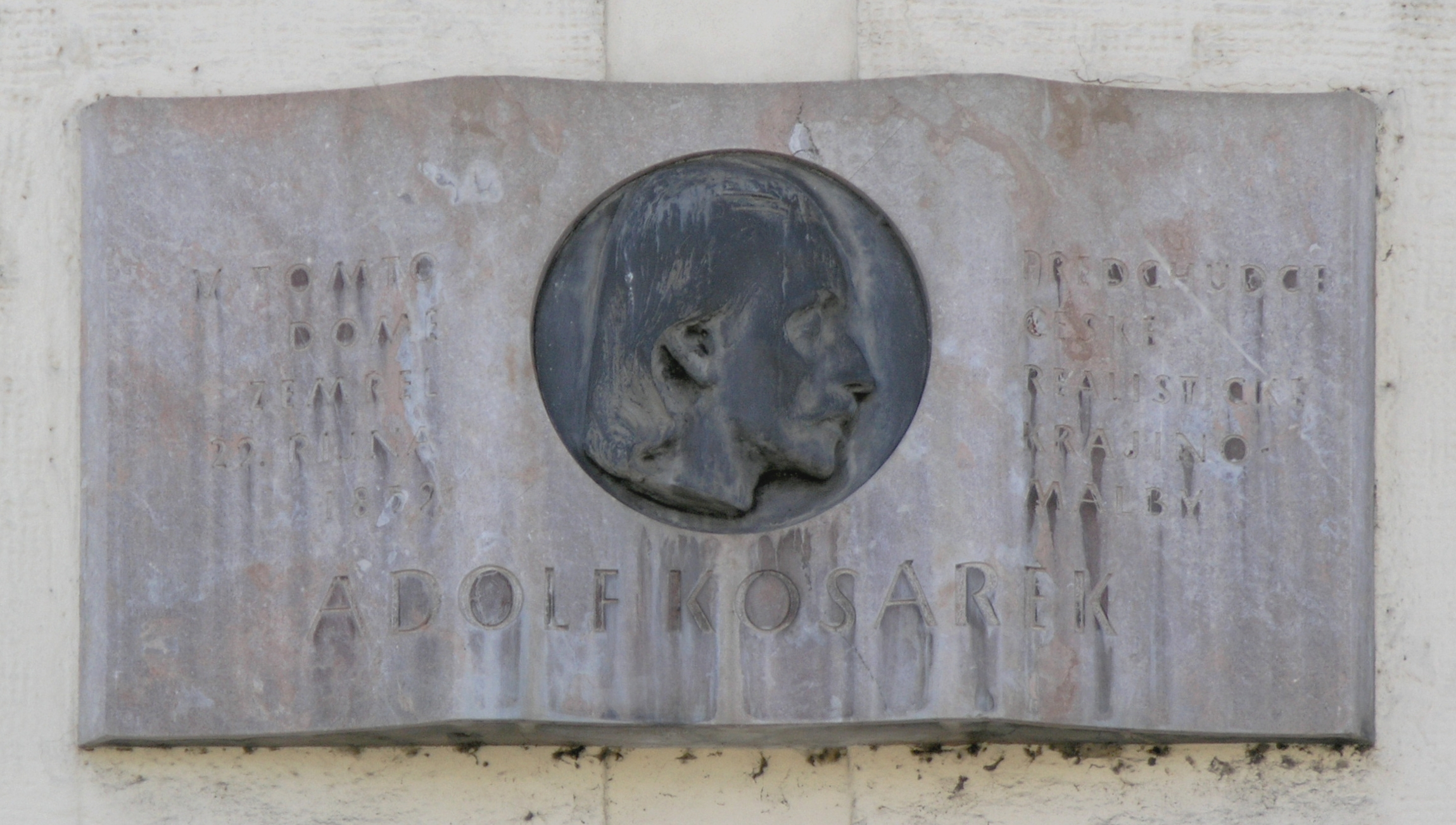 Praha, Malá Strana - Adolf Kosárek (Valdštejnská)